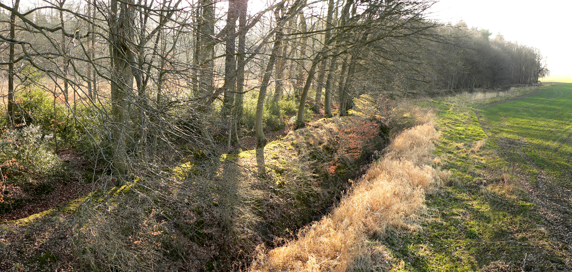 Schaumburger Landwehr westlich von Wiedensahl